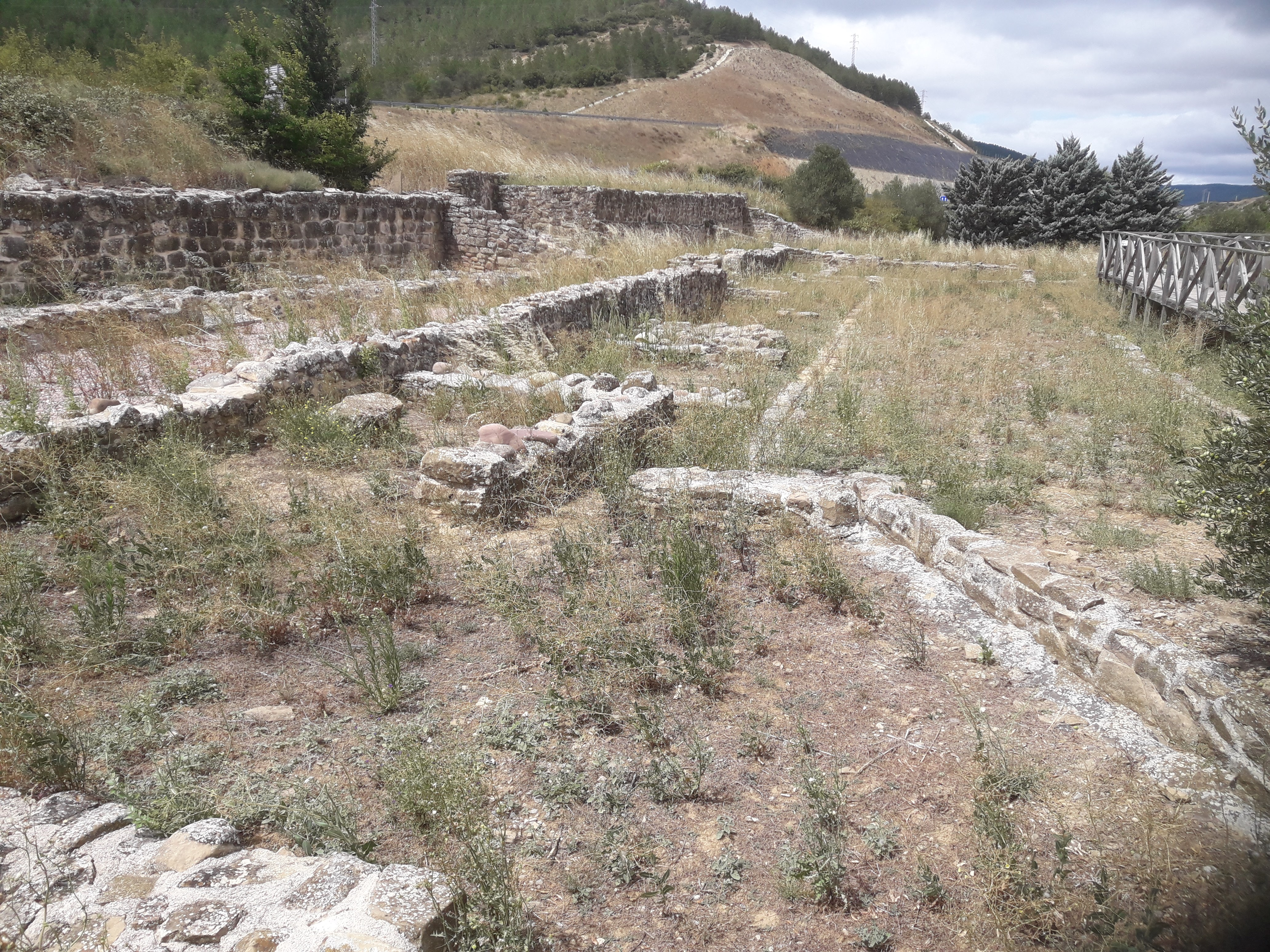 Vila romana de Liédena, a Navarra.